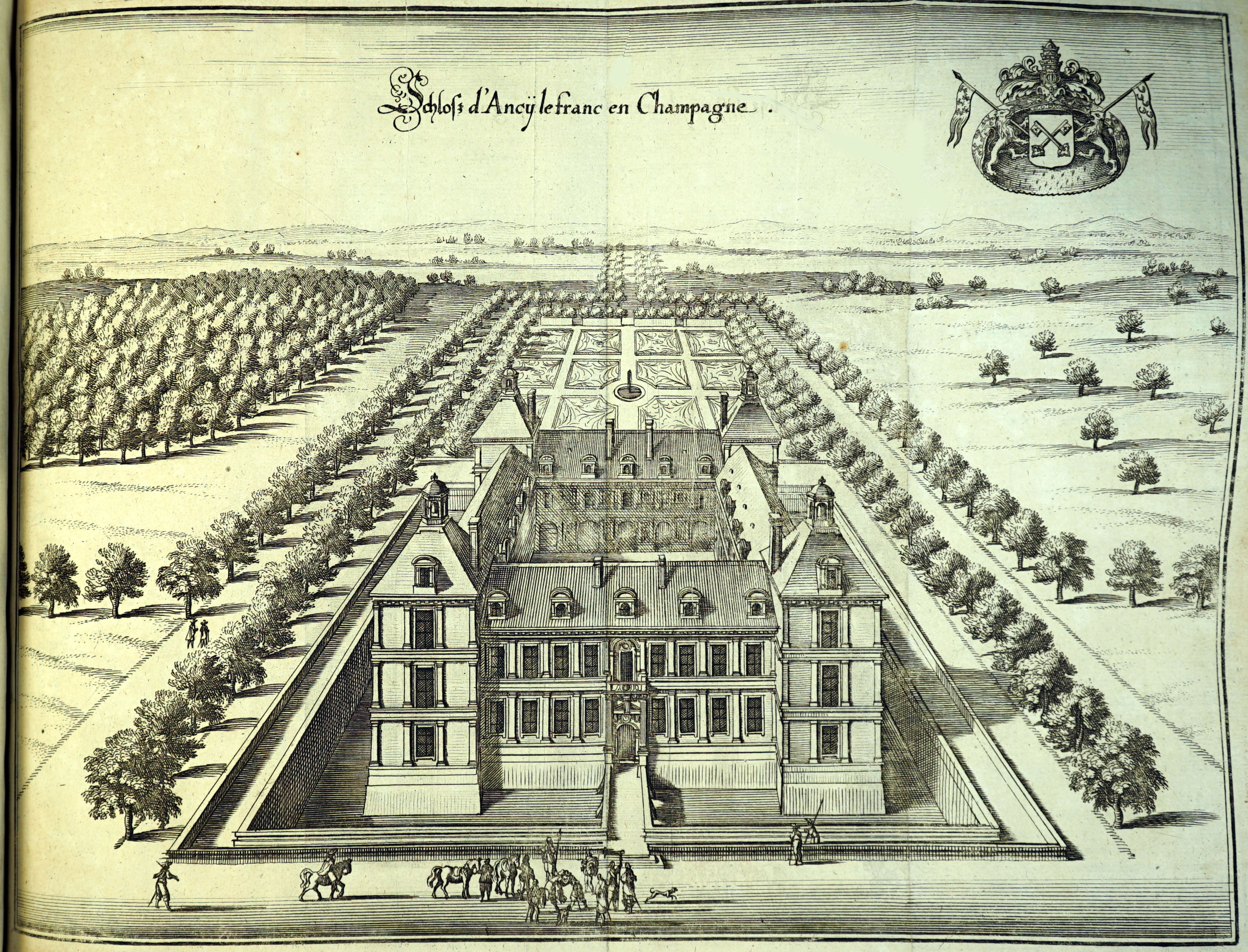 dessin extrait du livre.